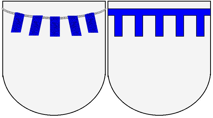 Eigen tekening Robert Prummel Maart 2007